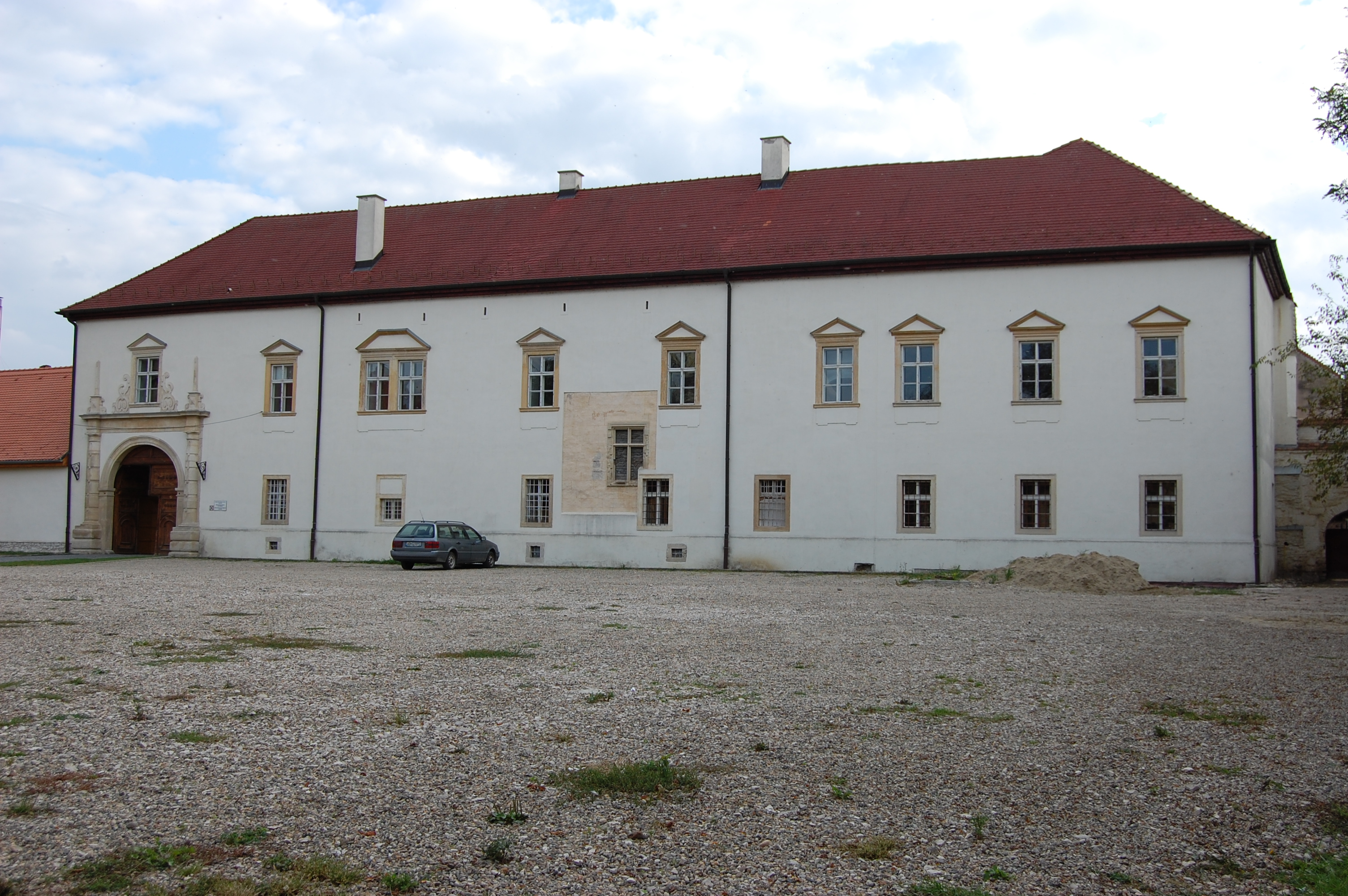 Gyulafehérvár, Római-Katólikus Püspöki palota